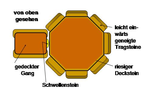 Polygonaldolmen